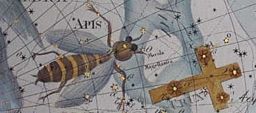 Imagen de la constelacion perdida de Apis.